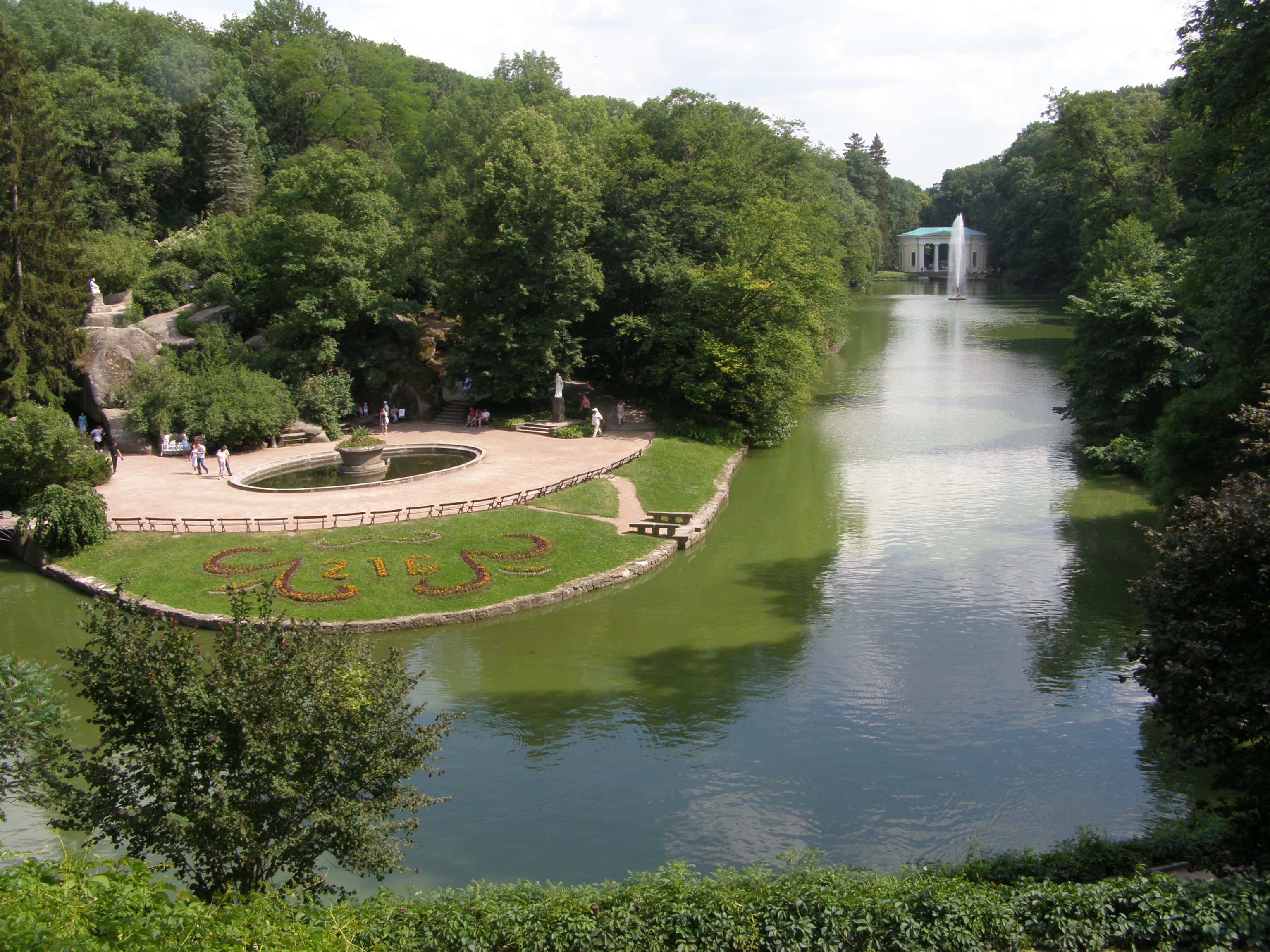 в парке Софиевка